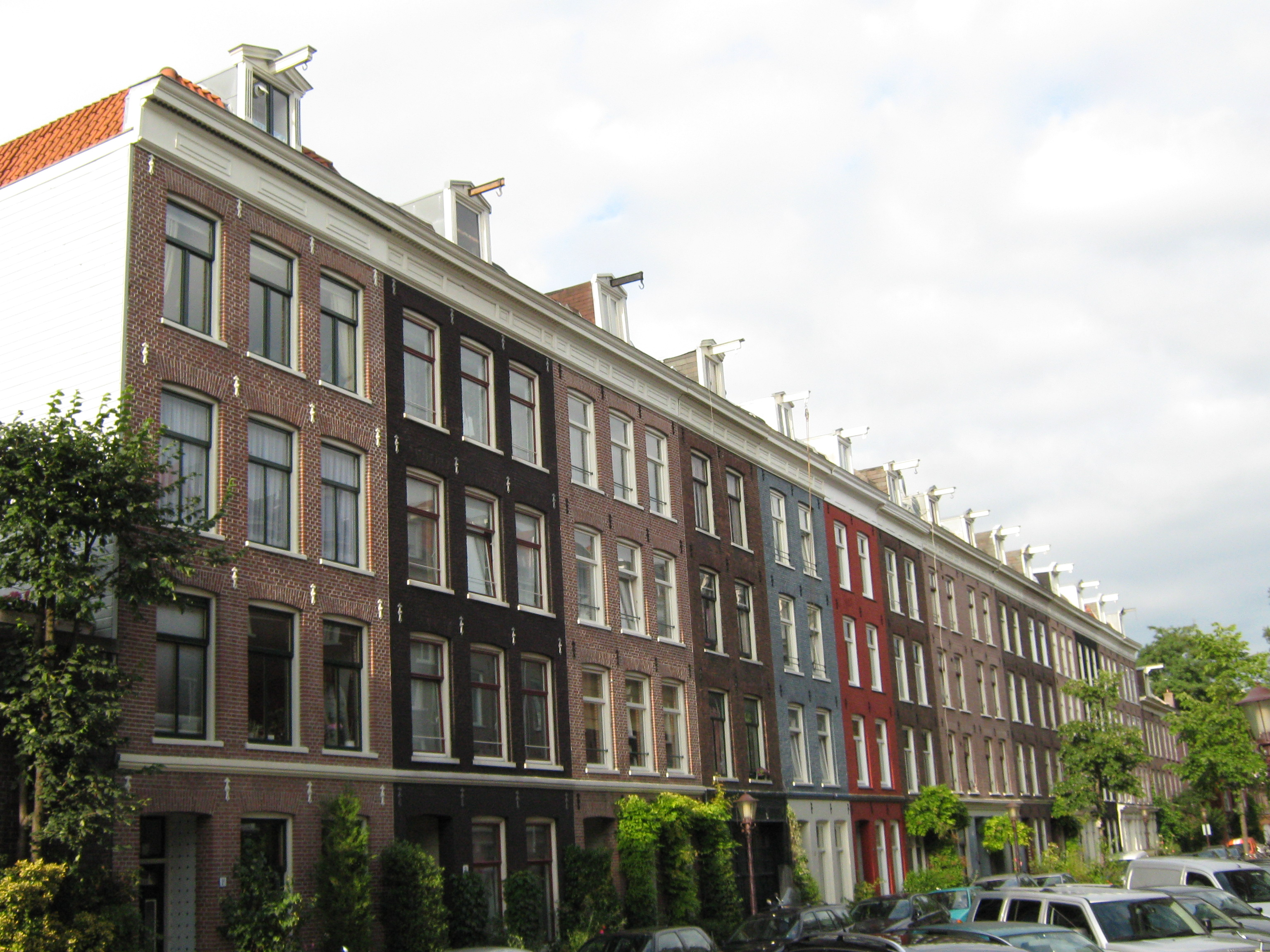 Revolutiebouw in de Daniel Stalpaertstraat; De Pijp, Amsterdam Oud-Zuid